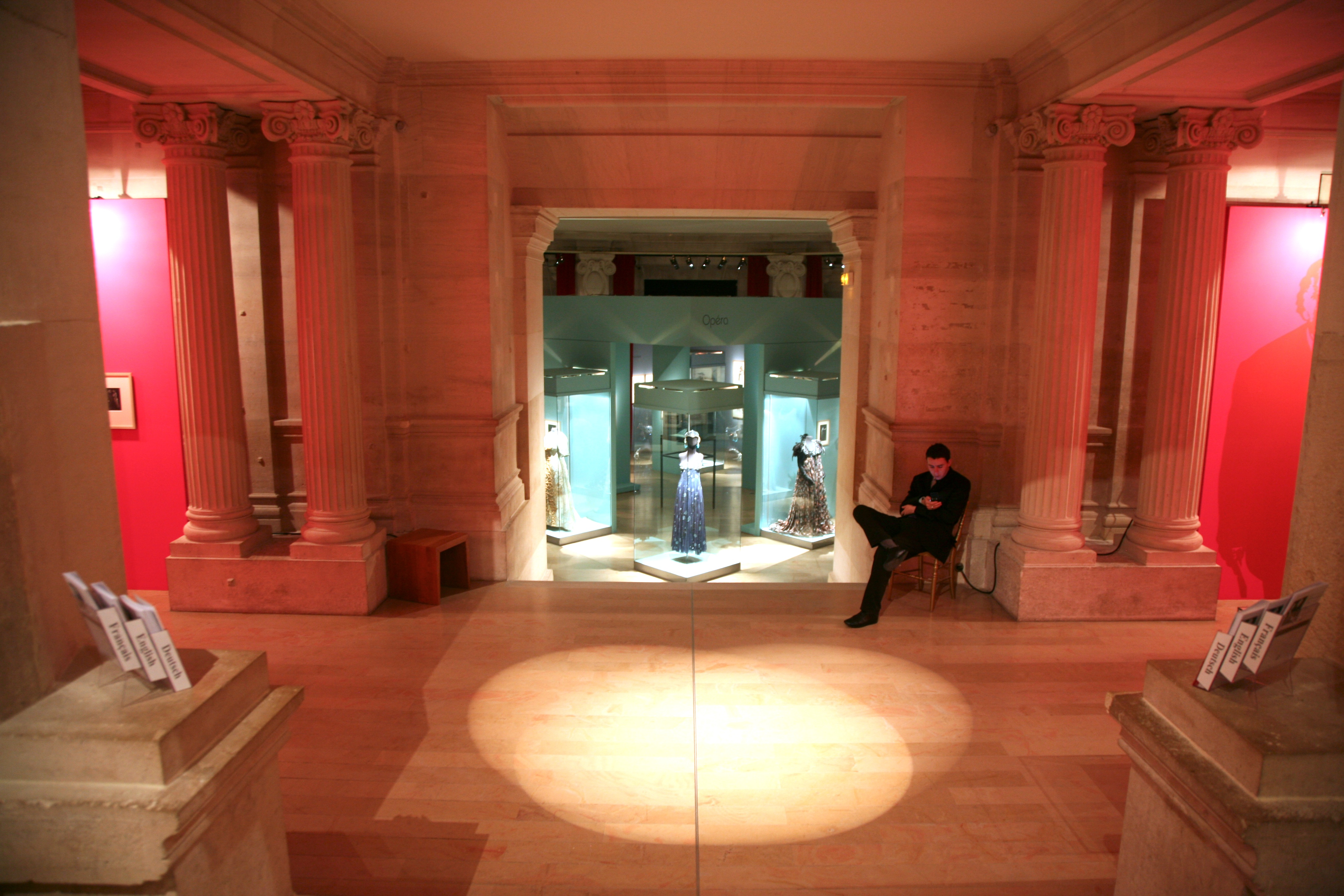 Bibliothèque-Musée de l'Opéra